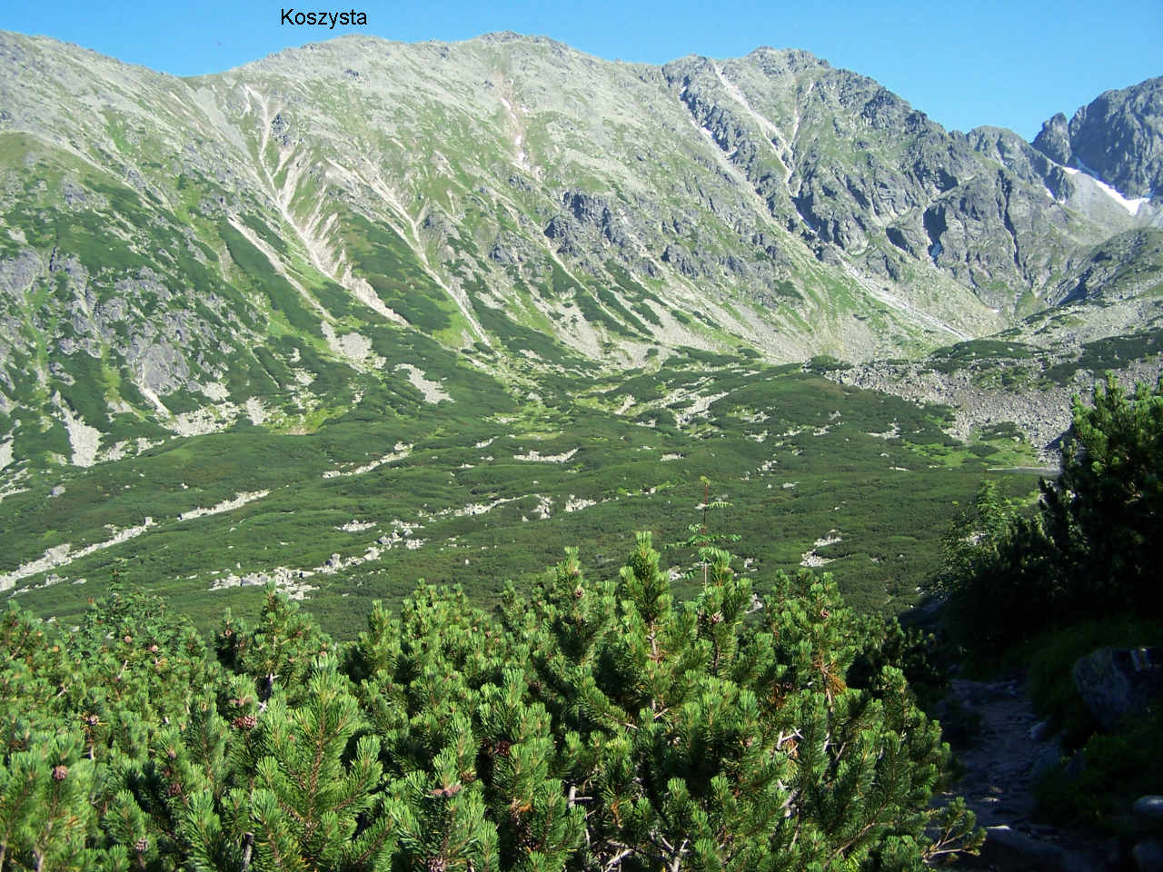 Dolina Pańszczyca (Tatra Mountains)